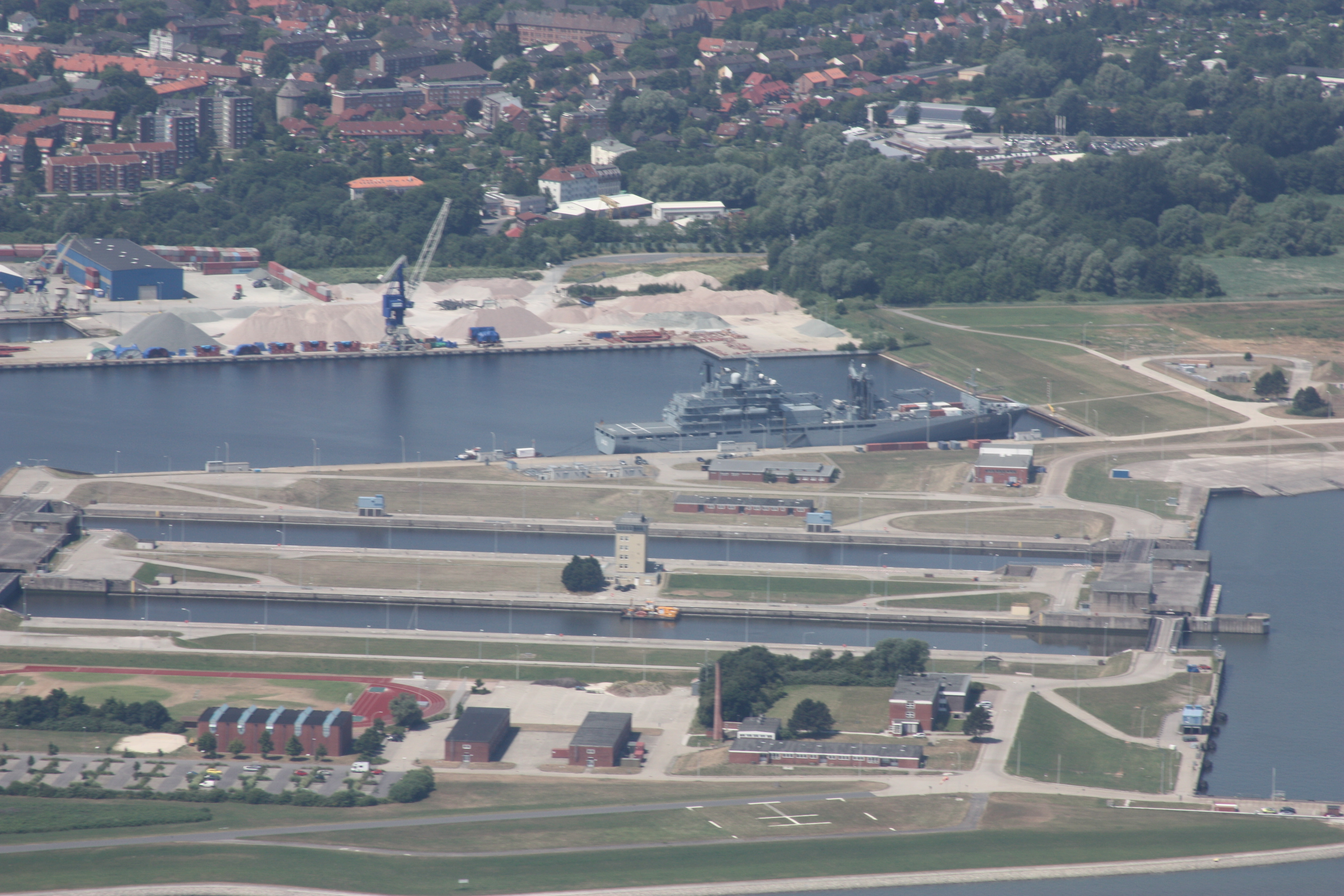 Flug über den Jadebusen und Wilhelmshaven, von Nord nach Süd; weiter nachOldenburg; Flughöhe 500 m = 1500 ft; Juli 2010